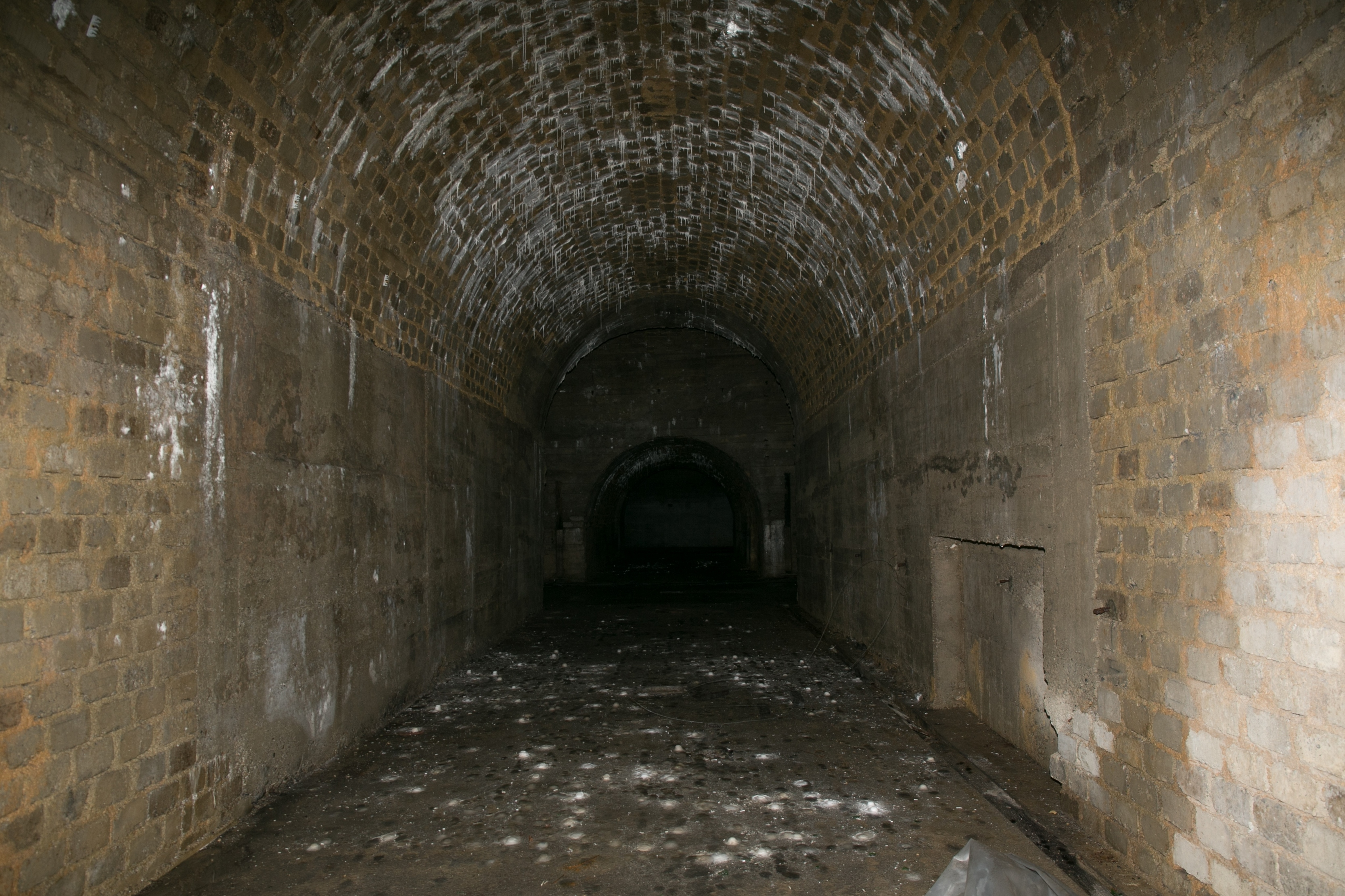 U-Verlagerung Marmor in der Peggauer Wand 'Q55477288' (Q55477288)